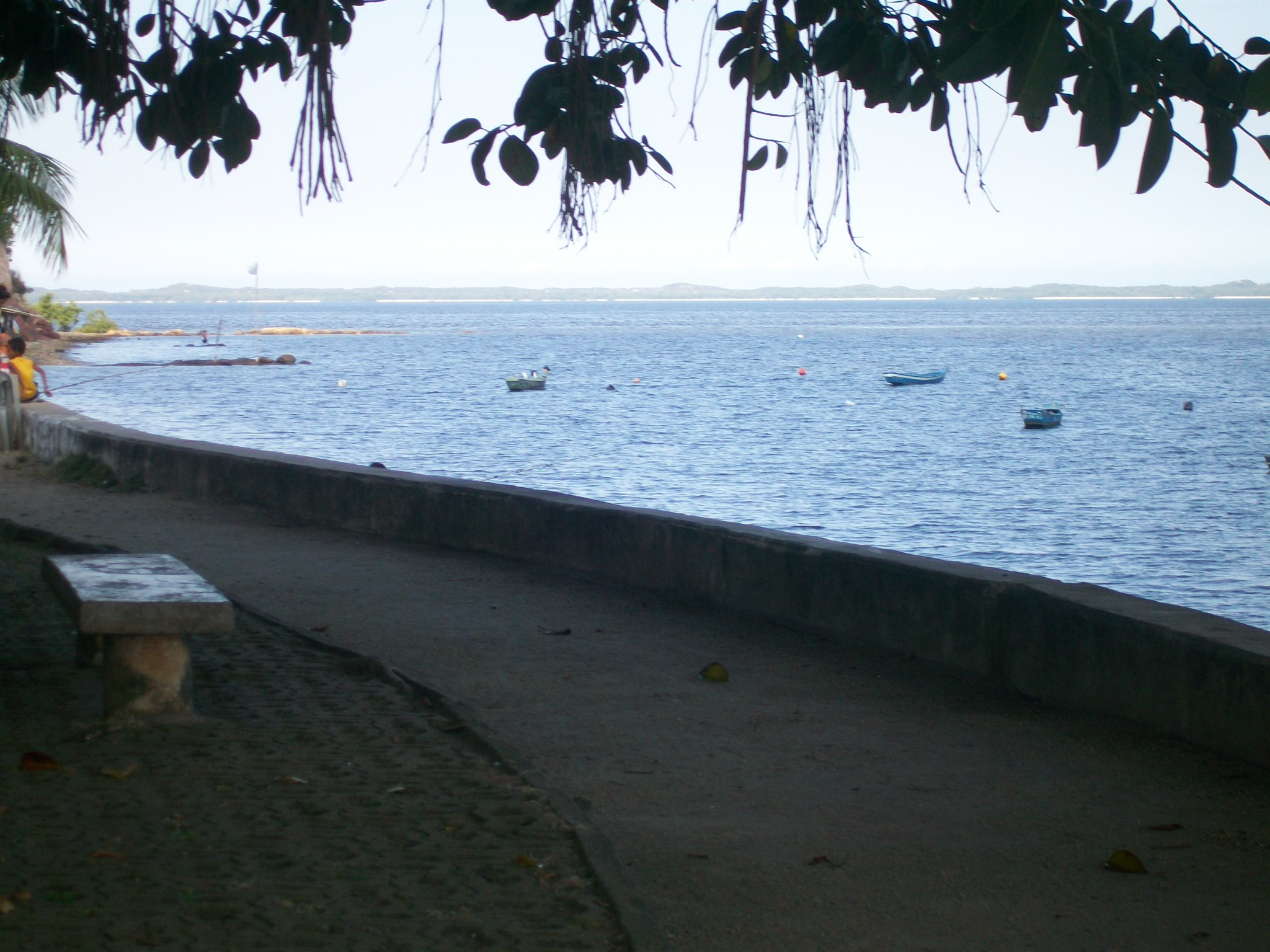 Baía de Sepetiba, vista da Praia do Recôncavo, Sepetiba, Rio de Janeiro